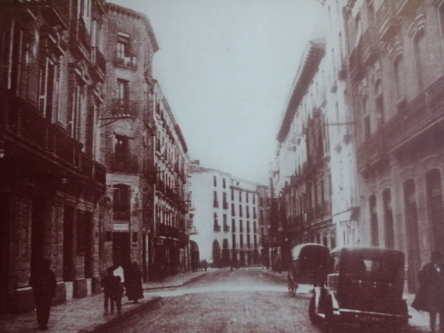 Aragonés: Imachen d'o Coso Baixo en Uesca.